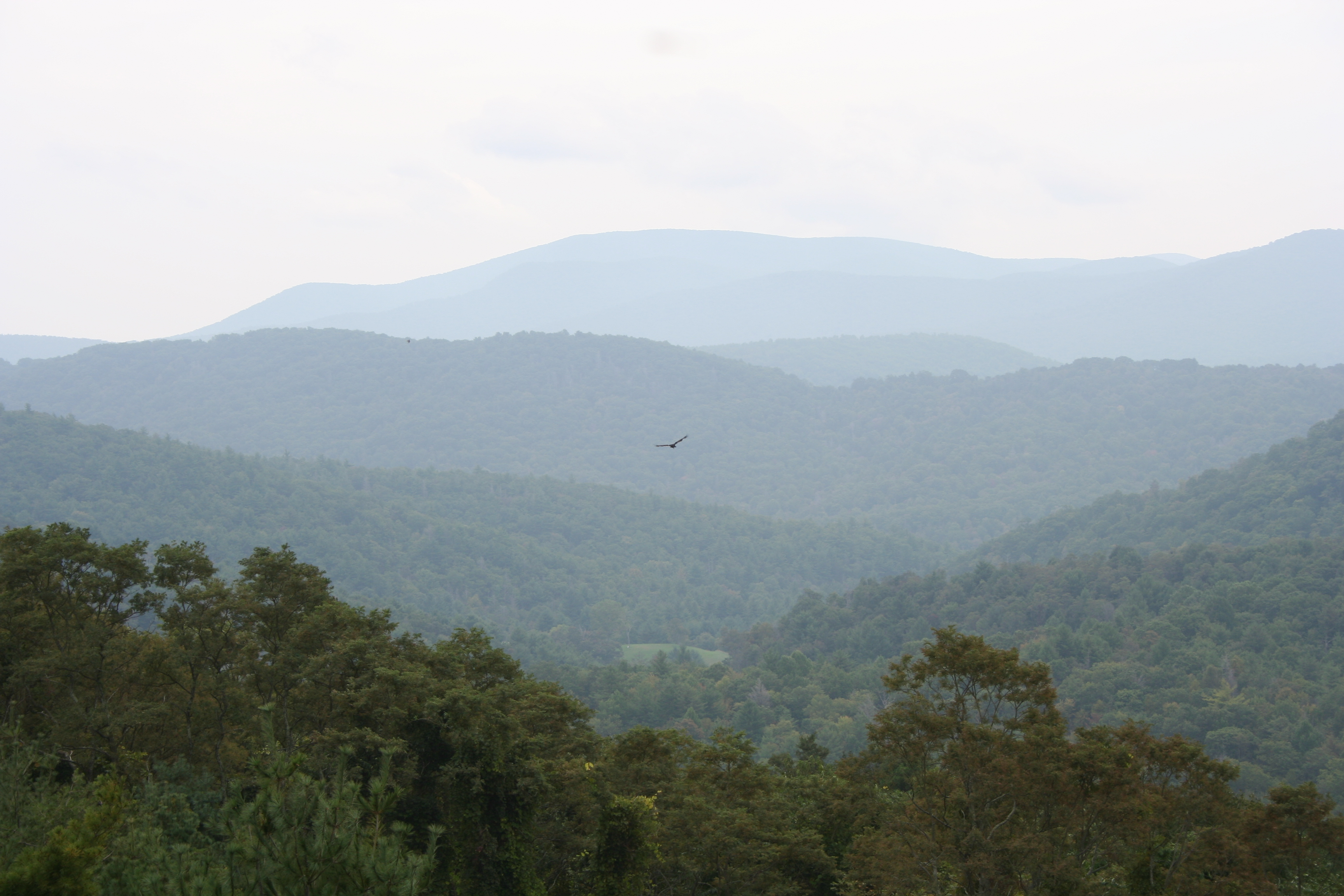 Adler im Blue Ridge Mountain Parkway, Nähe Great Smokey Mountains-Naturpark